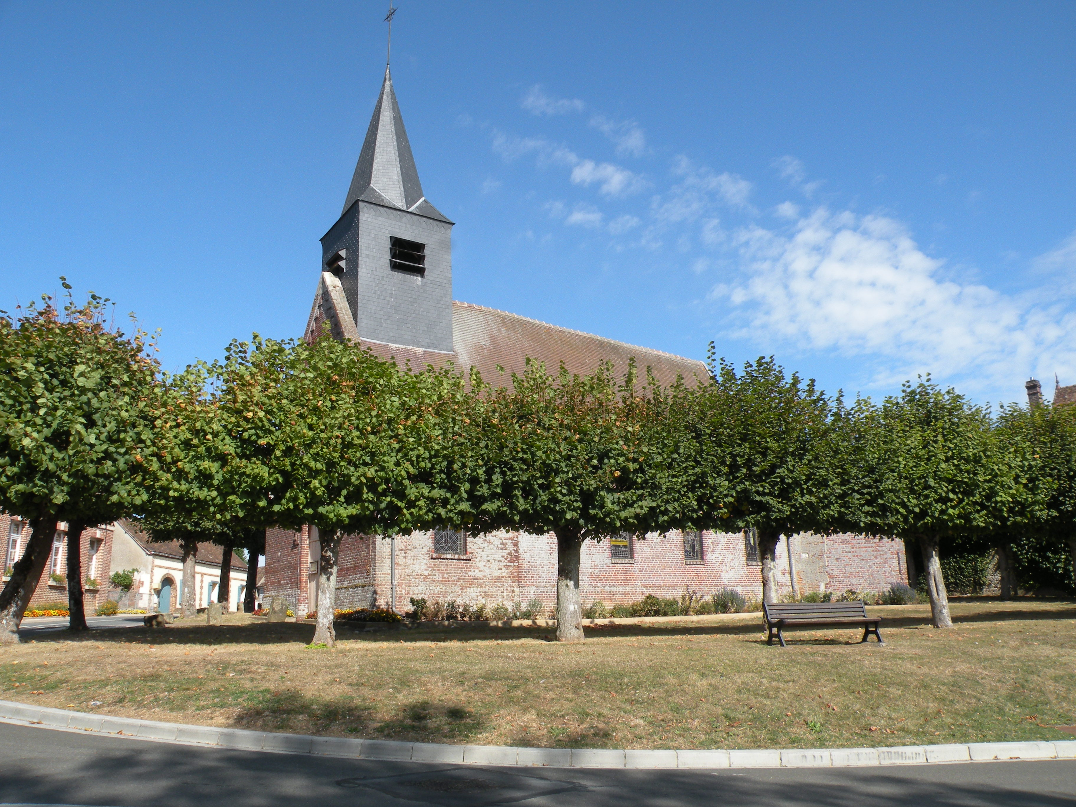 eglise du Mont-Saint-Adrien